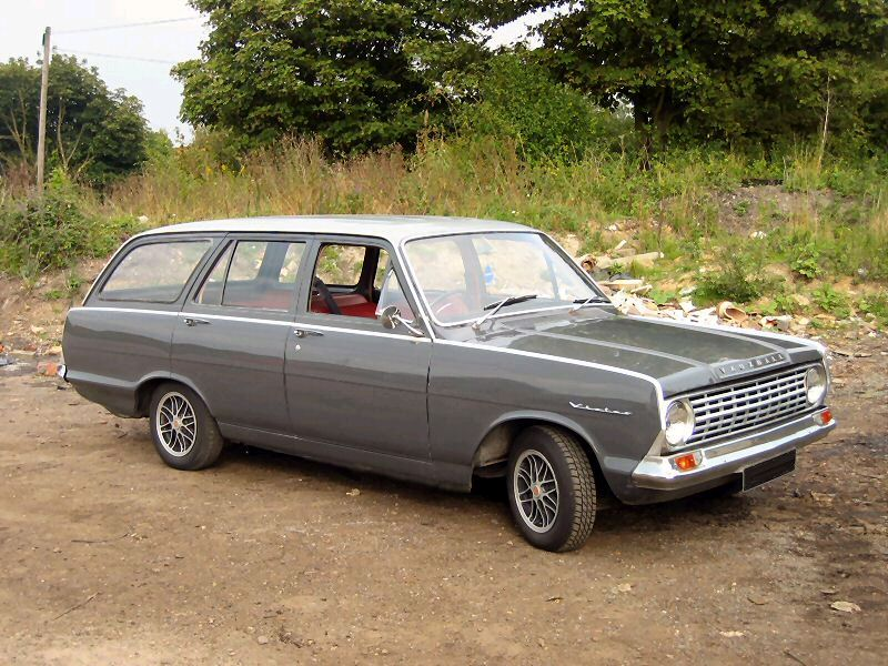 1965 Vauxhall Victor FC 101 Estate